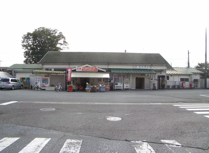 松田駅北口